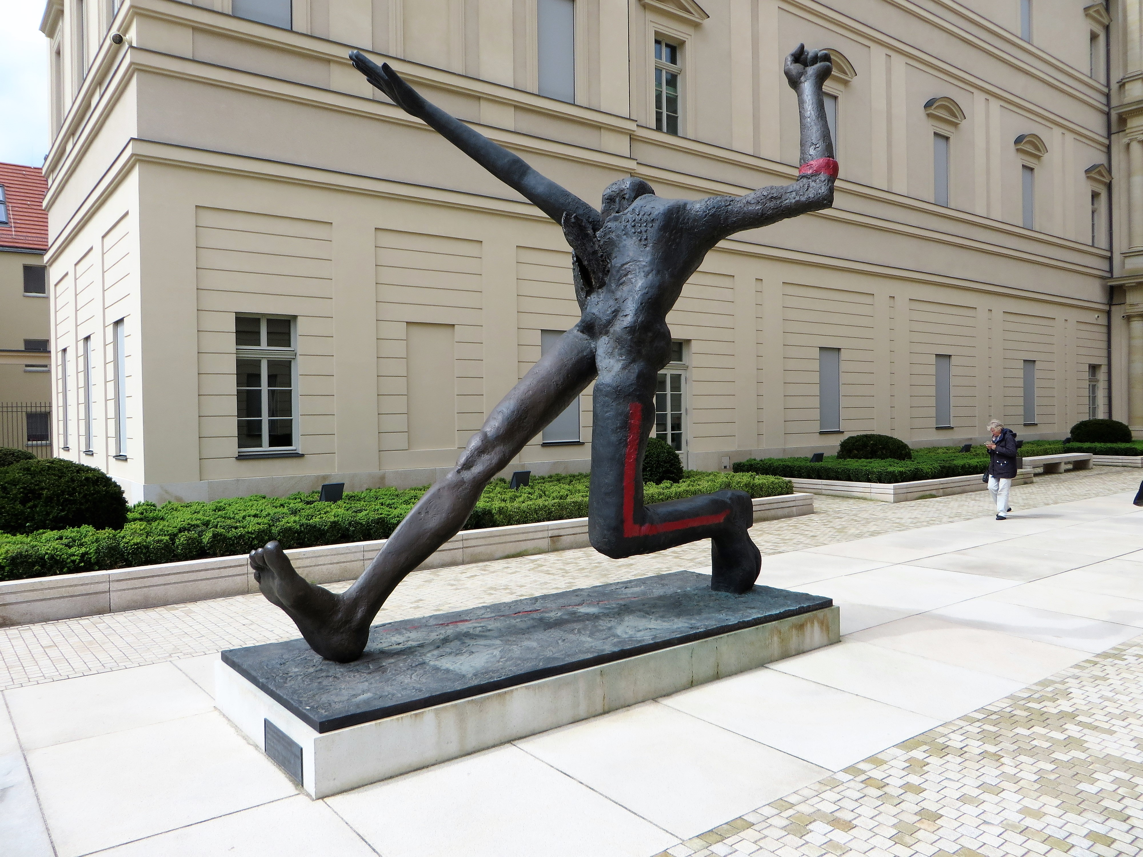 Museum Barberini in Potsdam. Innenhof mit der Bronzeplastik „Der Jahrhundertschritt“ von Wolfgang Mattheuer.